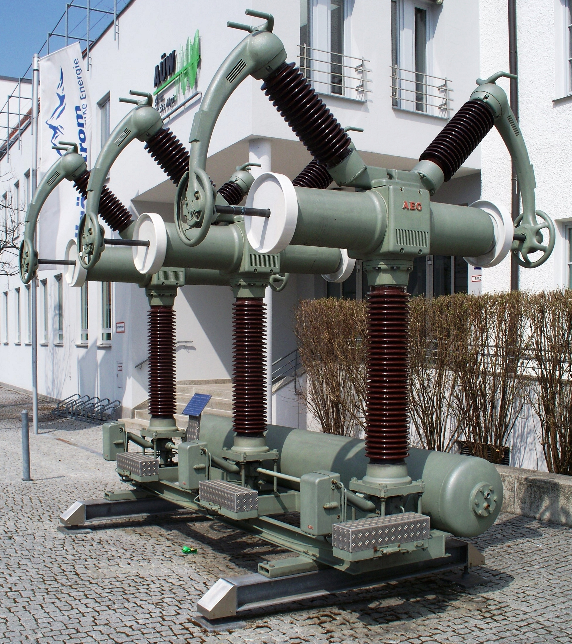 Ein Hochleistungs- Freistrahlschalter vom Typ II von AEG. Baujahr 1970. Ausgestellt in Kempten im Allgäu.